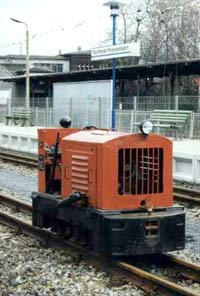 Author: Berliner Parkeisenbahn gGmbH. Ort: Berliner Parkeisenbahn Wuhlheide Inhalt: Diesel Lokomotove Typ NS1 Das Bild wurde von der BPE gGmbH für die Veröffentlichung freigegeben.